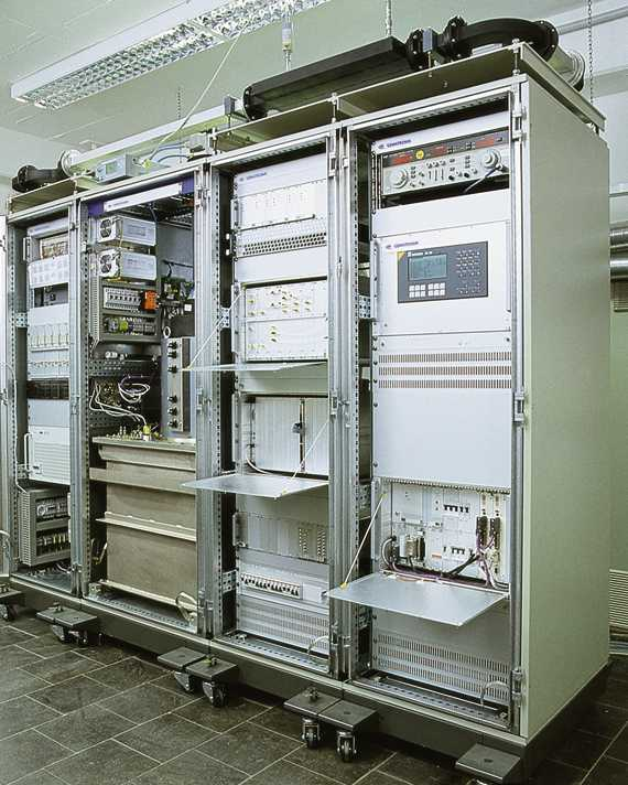 Sender und Empfänger des Wetterradars „Meteor 1500S”